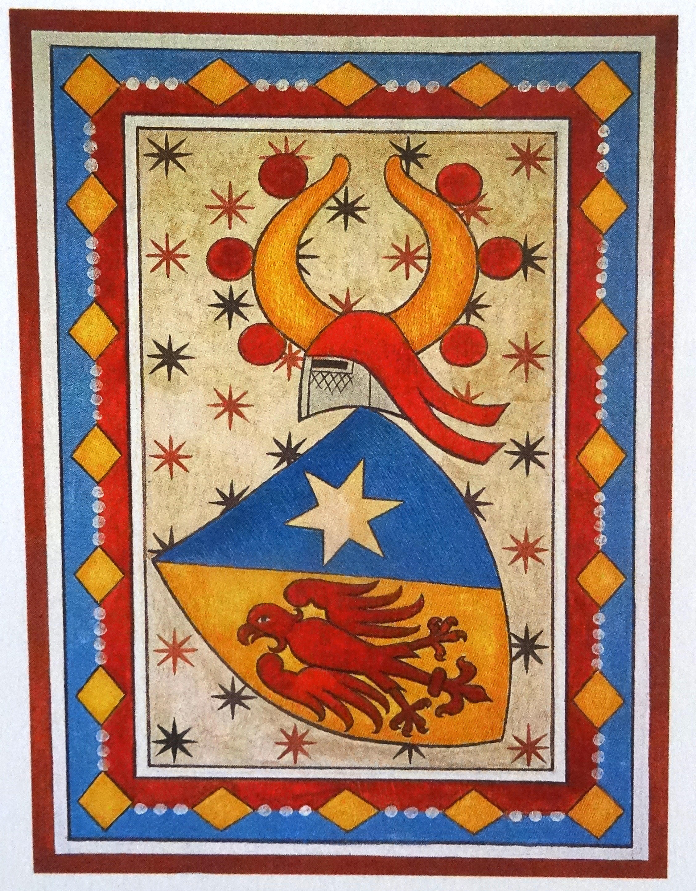 Wappen der Herren von Juvalt, Kanton Graubünden